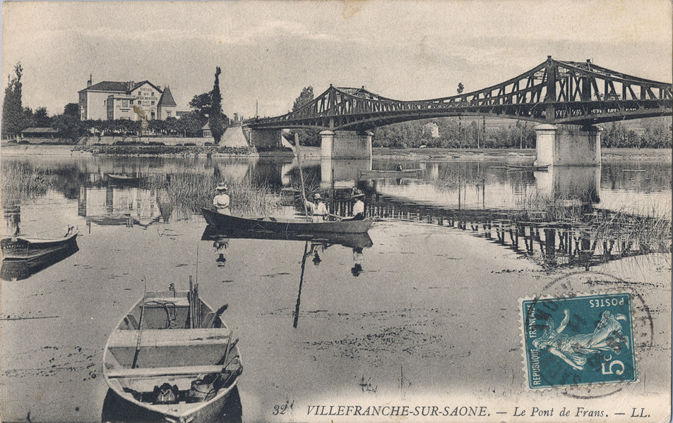 Le pont de Frans à Jassans-Riottier.